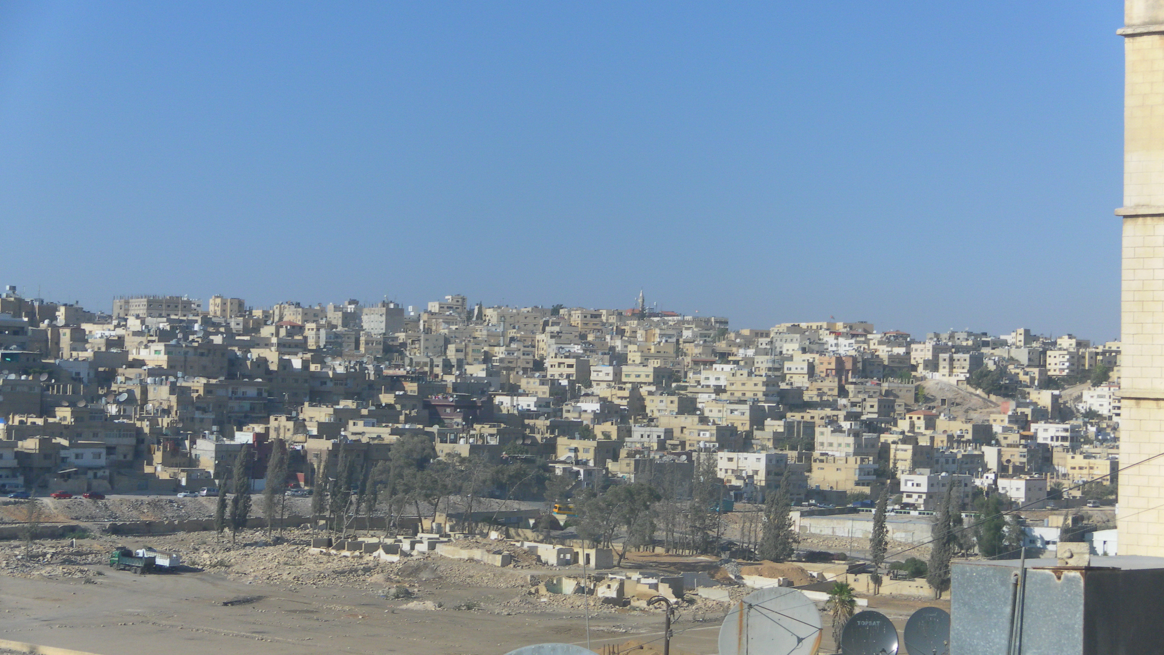 منطقة العامرية في مدينة الرصيفة، مشهد من الجبل الجنوبي باتجاه الجبل الشمالي. الرصيفة، الأردن